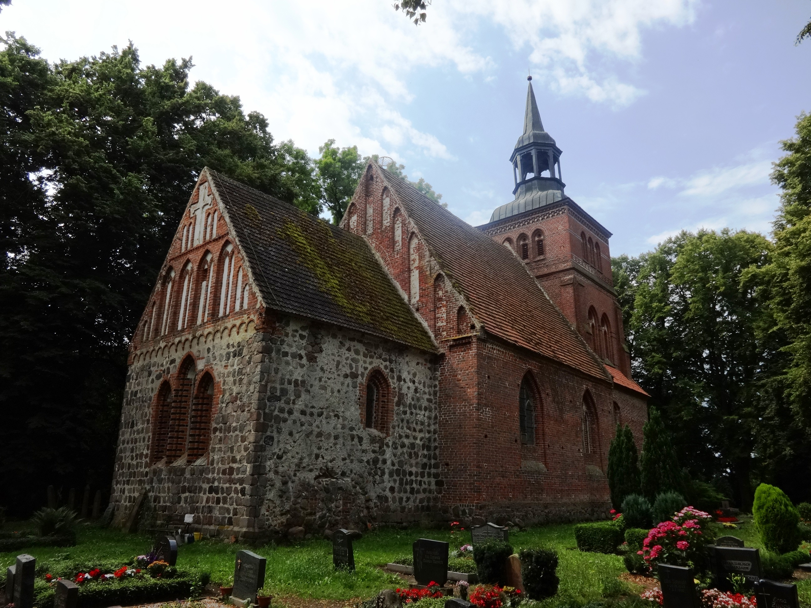 Die St.-Laurentius-Kirche Groß Kiesow ist ein aus dem 13. Jahrhundert stammendes Kirchengebäude in der Gemeinde Groß Kiesow. Zur Ausstattung gehört ein ehemaliges Altargemälde, eine Kopie der Kreuzigung nach Anton van Dyck, aus der Zeit um 1700. Auf dem Friedhof stehen mehrere Grabwangen aus dem 18. und 19. Jahrhundert